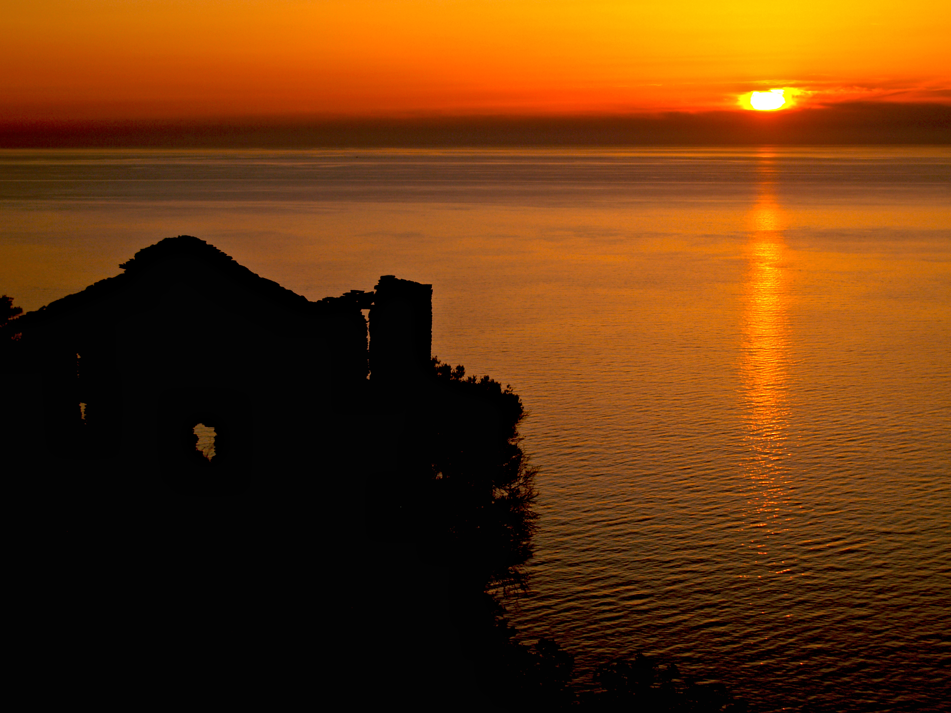 Nonza (Corsica) - Ruines de Sassa au couchant